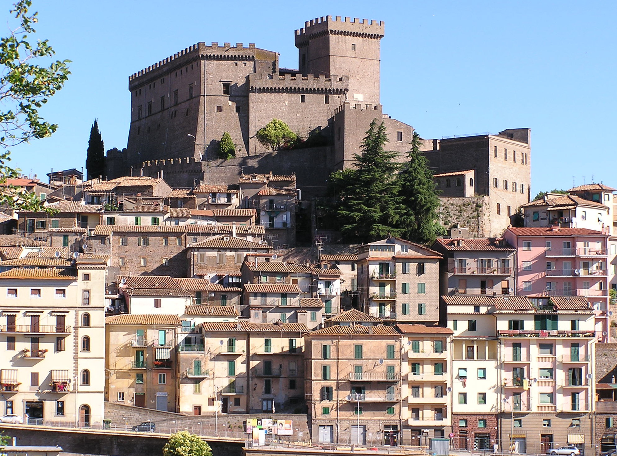 Soriano nel Cimino (Viterbo) Ort & Datum: 2.7.2005